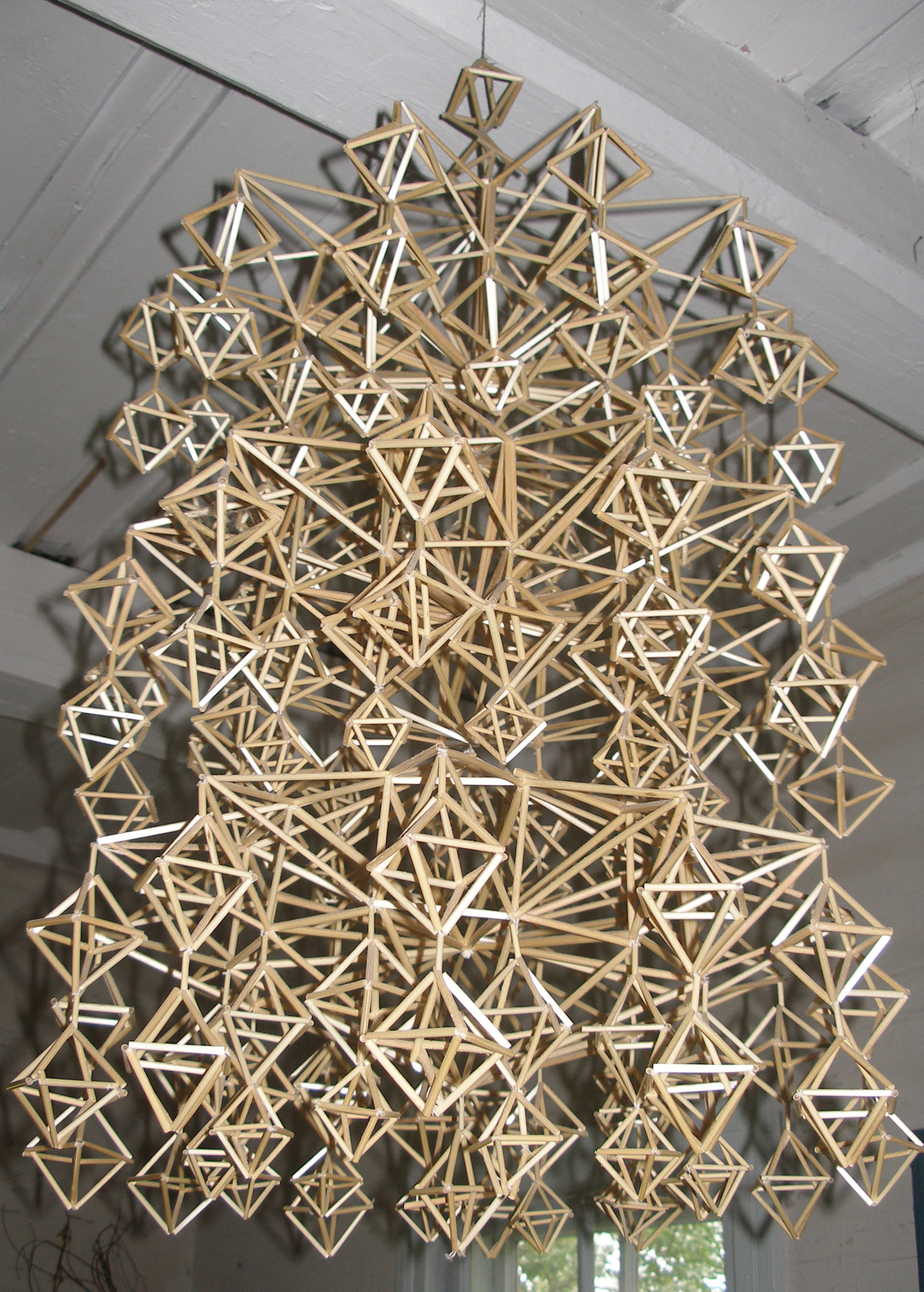 Eksponatas Marcinkonių Etnografiniame muziejuje - šiaudiniai sodai. Nuotrauka naudojama su autorės (Lady of the Rings) leidimu.